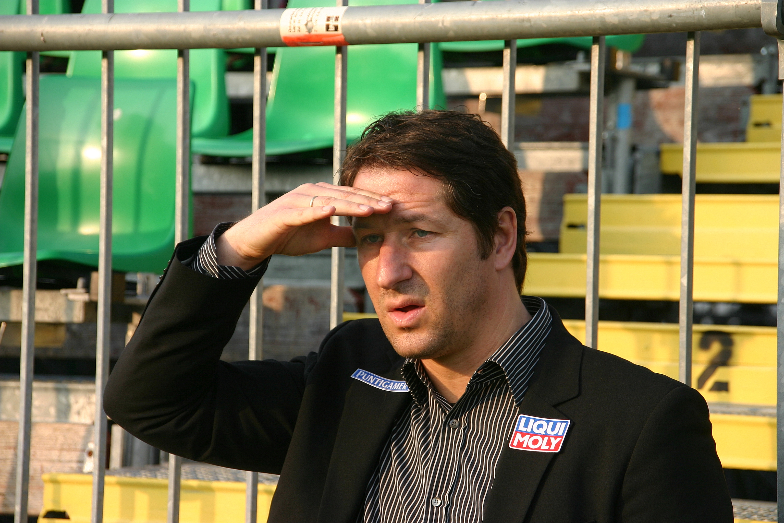 Franco Foda, Fußballtrainer – SK Sturm Graz (quer)